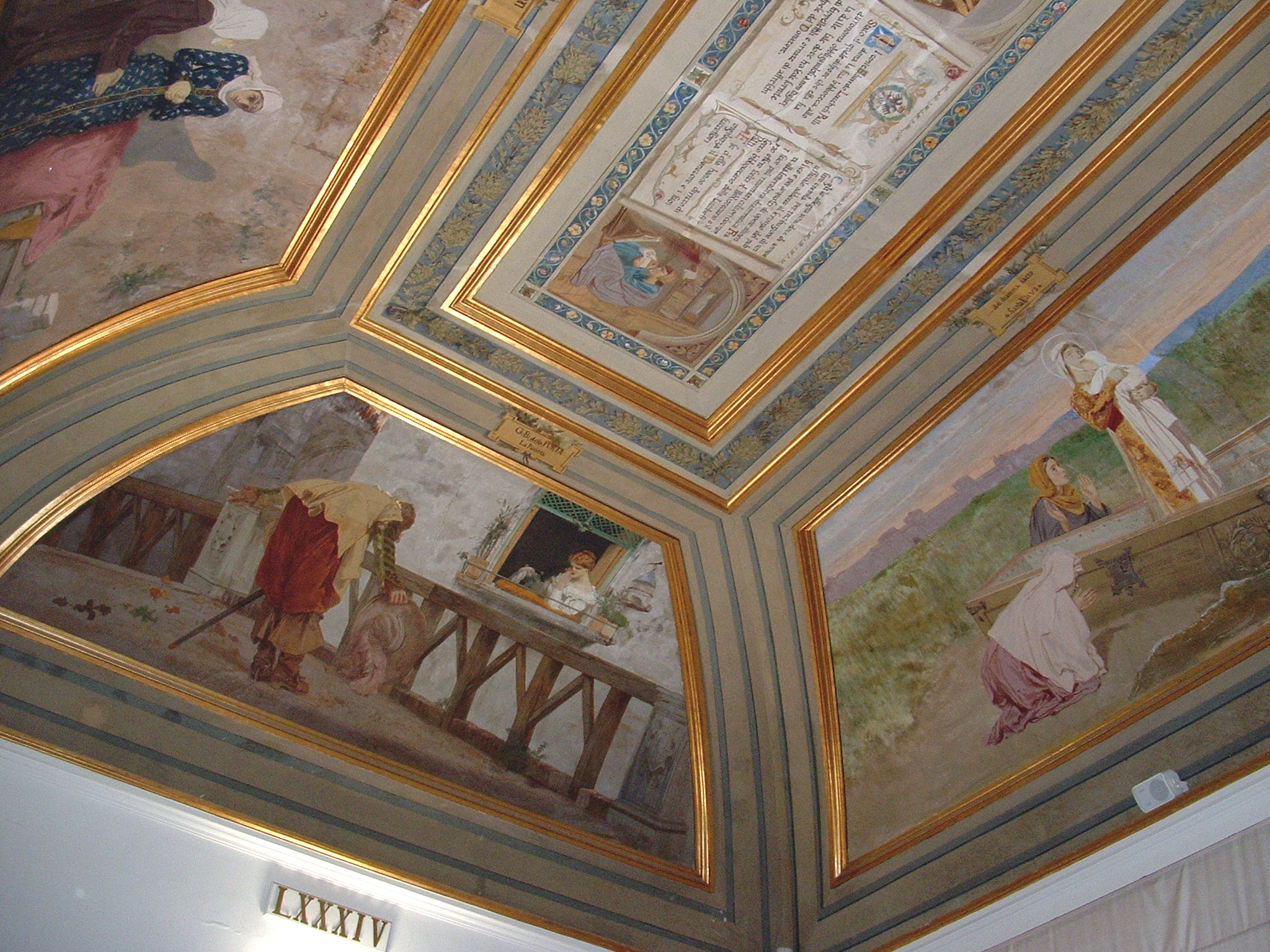 Napoli, Museo Archeologico Nazionale. Sala 84, volta con affreschi di Paolo Vetri destinati alla Biblioteca Lucchesi-Palli. Al centro è visibile il cartiglio nel quale vengono ricordati i principali accordi per la tenuta di questa biblioteca caratterizzata principalmente da testi teatrali e musicali.